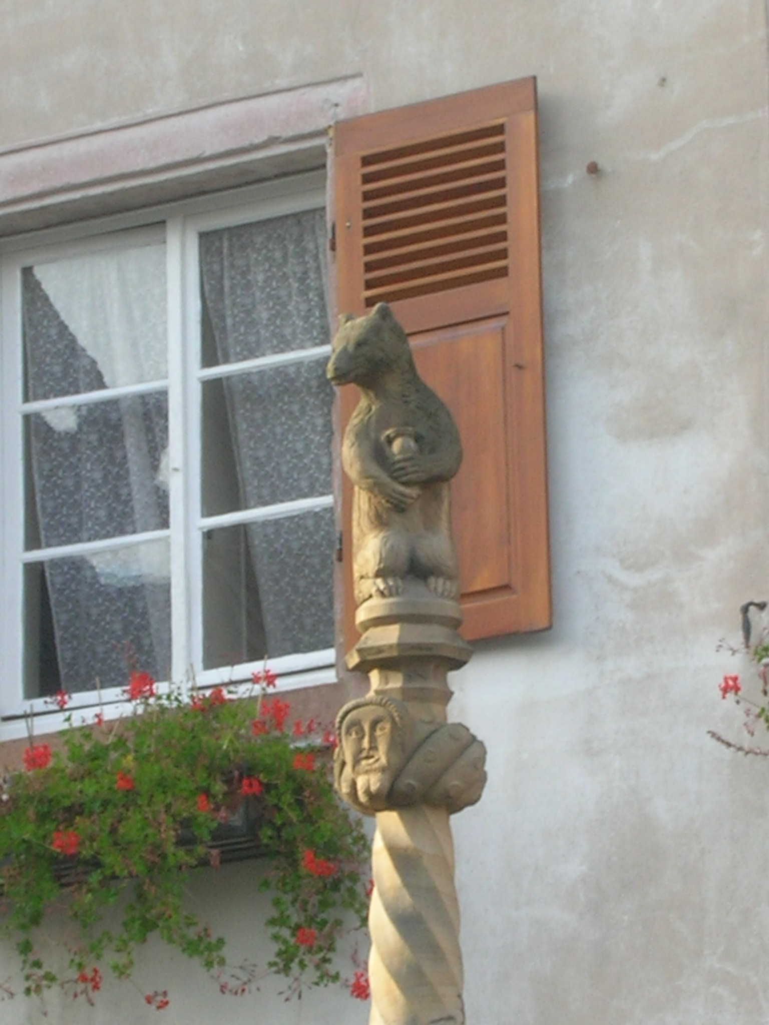 Fontaine de l'ours de style renaissance. Détail de l'ours dominant la fontaine. (Dambach-la-Ville, Bas-Rhin, France) Selon la tradition, un enfant à l'aide d'un ours aurait découvert les premiers ceps de vigne à Dambach. De nos jours, Dambach est l'un de plus importants centres d'elaboration de vin d'Alsace. Según la tradición, un niño fue el descubridor de las primeras cepas en Dambach al descubrir un osezno dandose un festin con ellas. Hoy en día, Dambach es uno de las principales centros productores de vino en Alscacia